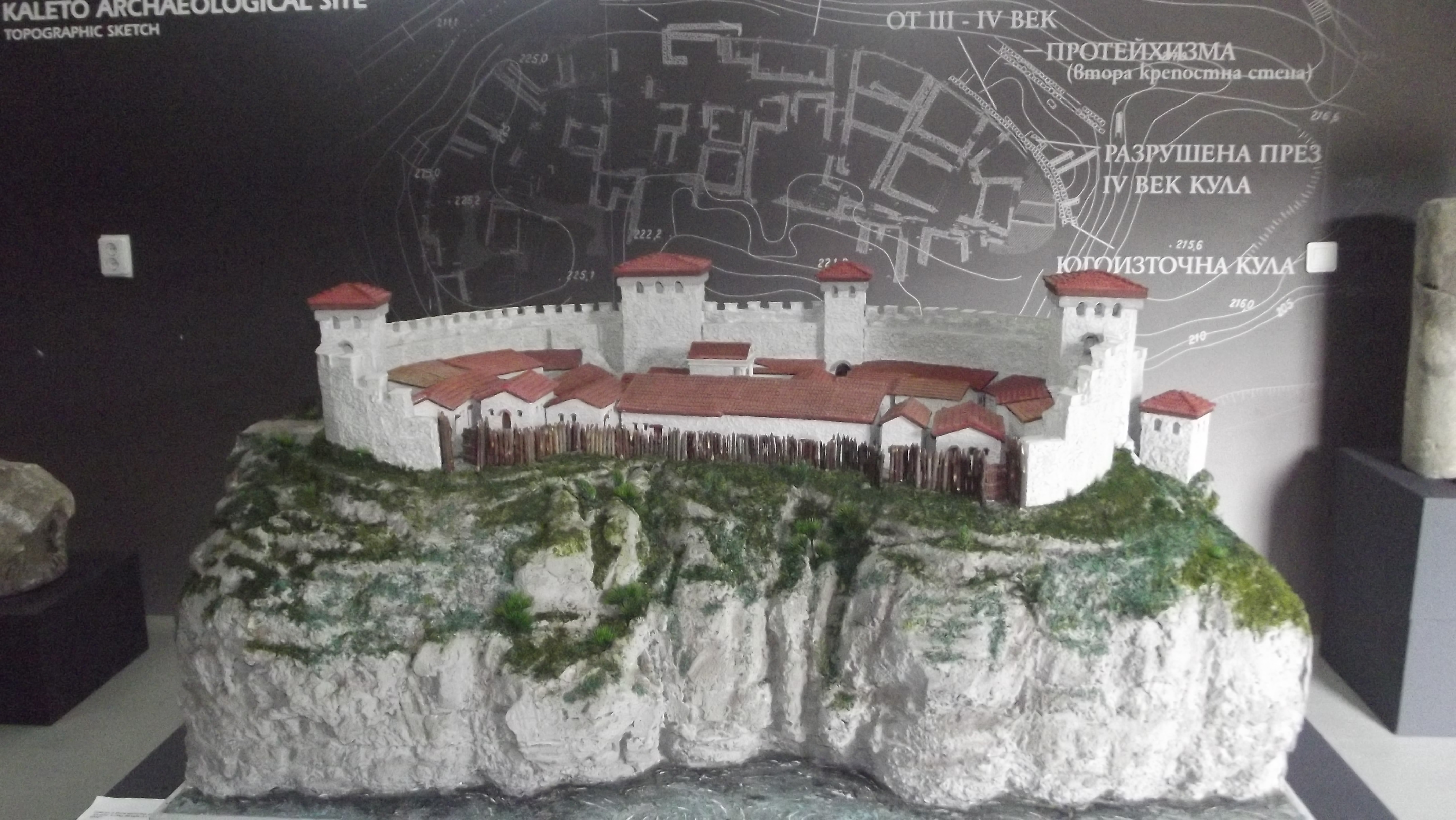 макет кале 1